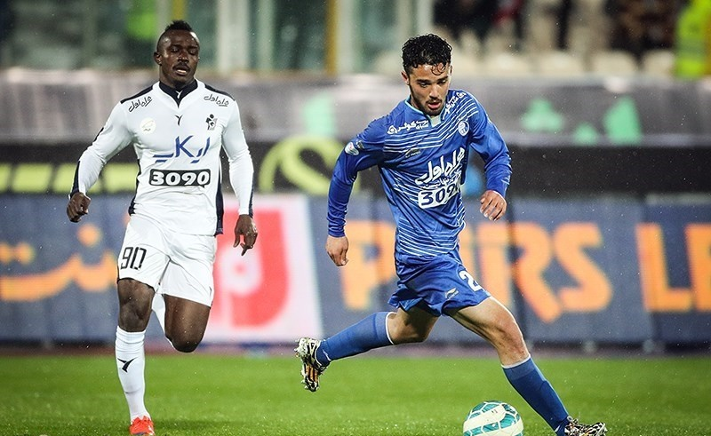 دیدار تیم های فوتبال استقلال و پیکان